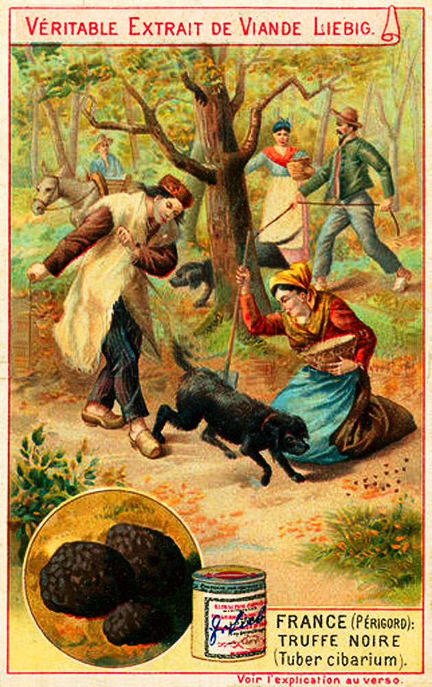 Chromo Liebig pour la Tuber cibarium ex dénomination de la Tuber melanosporum